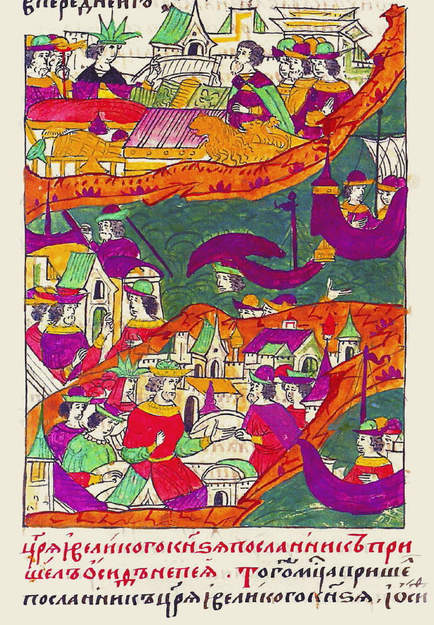 Иван IV отправляет Осипа Непею в Англию. Миниатюра Никоновской летописи. XVI век. "Пришел посланник царя и великого князя Иосиф Непея. В том же месяце вернулся посланник царя и великого князя Иосиф [Непея от Филиппа, короля Испанского и Английского, и от королевы Марии. А рассказал Непея, что по пути в Английскую землю разбилo их корабли на море. Посланник короля Рыцерт с товарищами утонул в море, а их прибило к берегу Штоцкого королевства, и оттуда его отпустили в Английскую землю, и король Филипп принял дары царя и великого князя с великою любовью и честью и обратно к царю и великому князю отпустил. И написали с ним король Филипп и королева Мария с великою любовною почестью, и в подарок прислали царю и великому князю живых льва и львицу, а король прислал свой полный доспех, скорлаты и многие атласы, и Непее в своем жаловании преподнесли большой подарок, а гостям царя и великого князя открыли свободный путь и дали им двор в своем большом городе Лунском, и разрешили торговать без всяких пошлин. И отпустил король с Непеем многих мастеров, докторов и искателей золота и серебра, и делателей, и многих других мастеров, которые пришли вместе с Непеем.]"